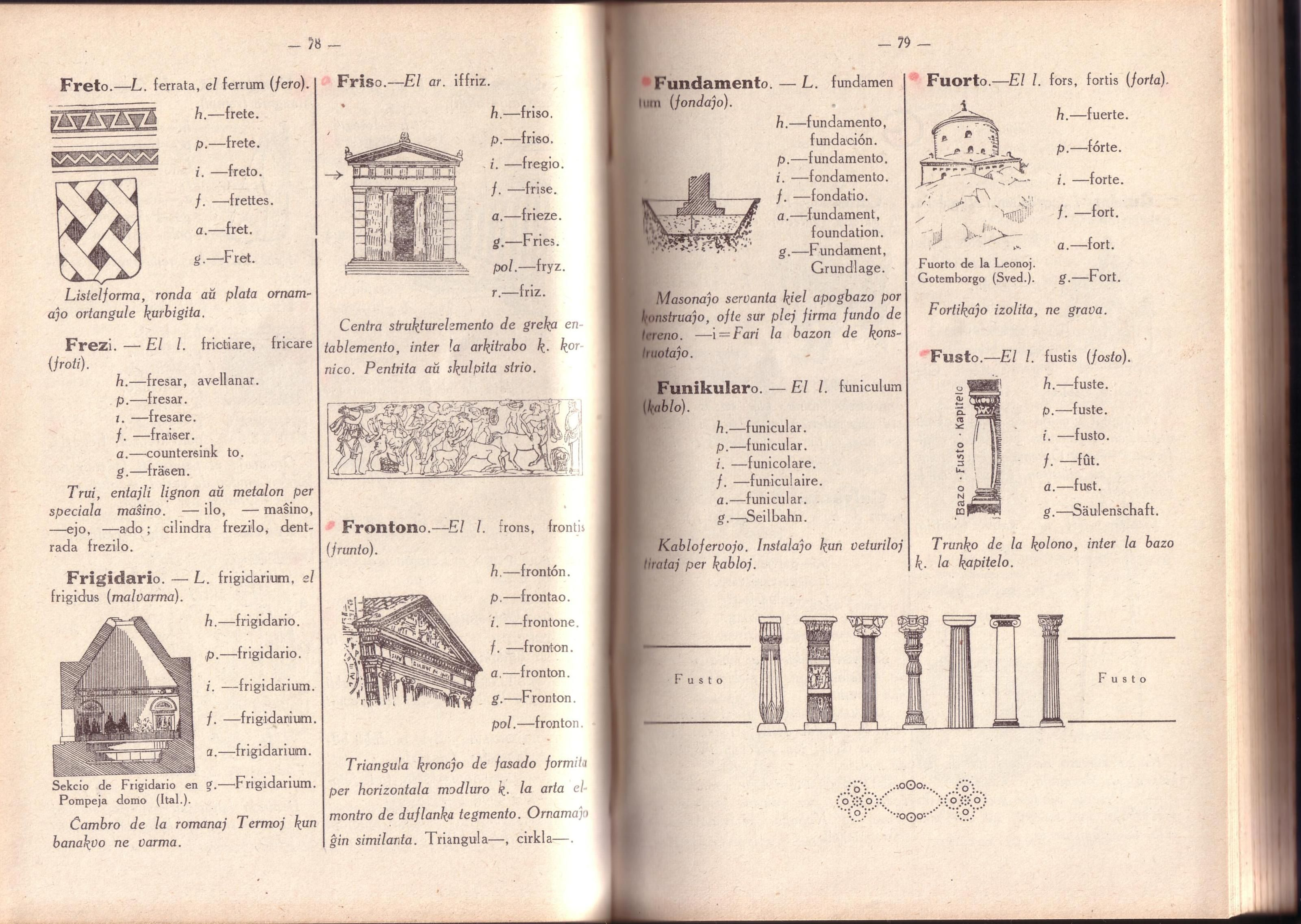 Ekzemploj de arkitekturaj terminoj en Esperanto en la Terminologio de Azorín